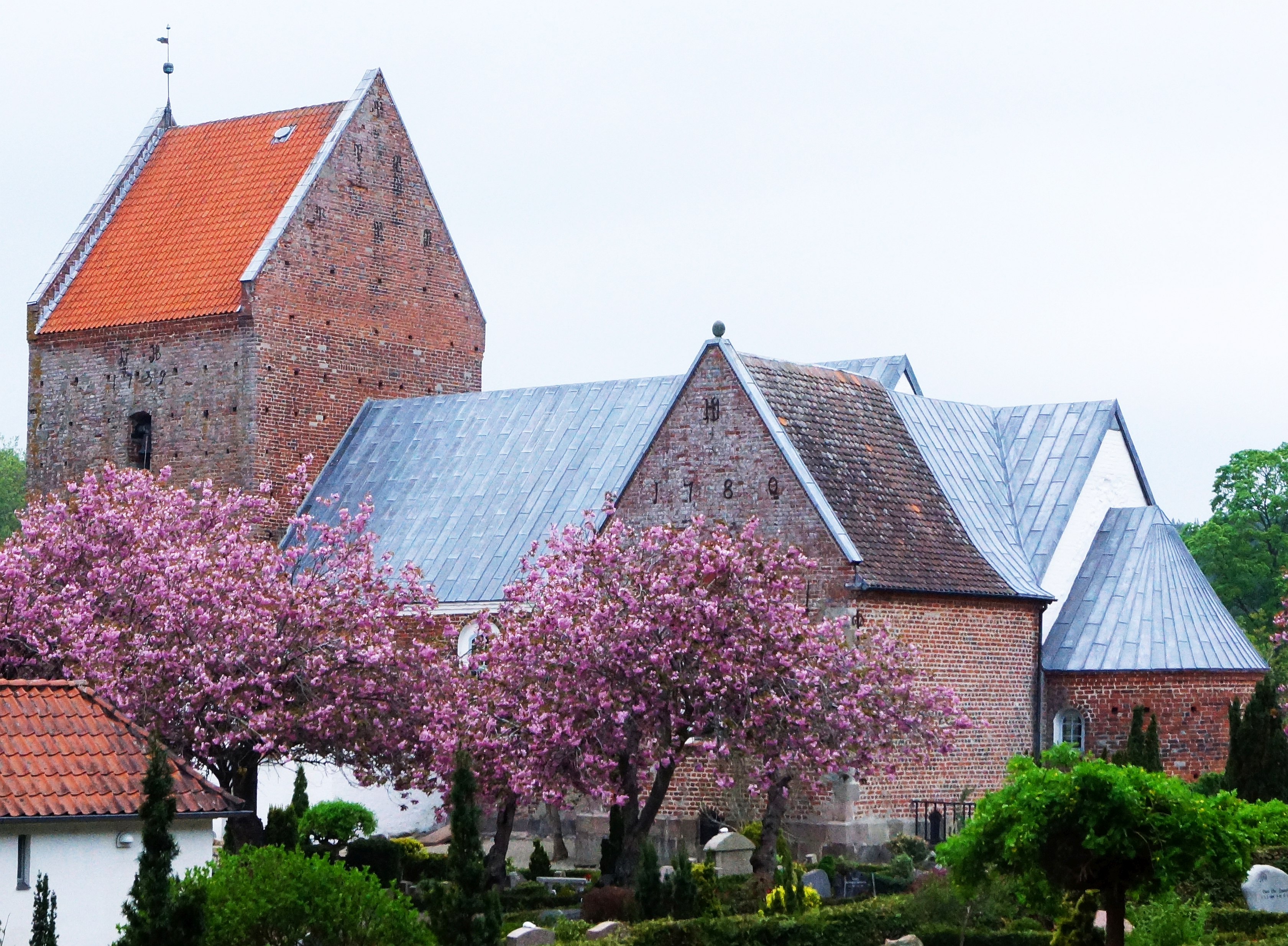 Marie Magdalene Kirke forår